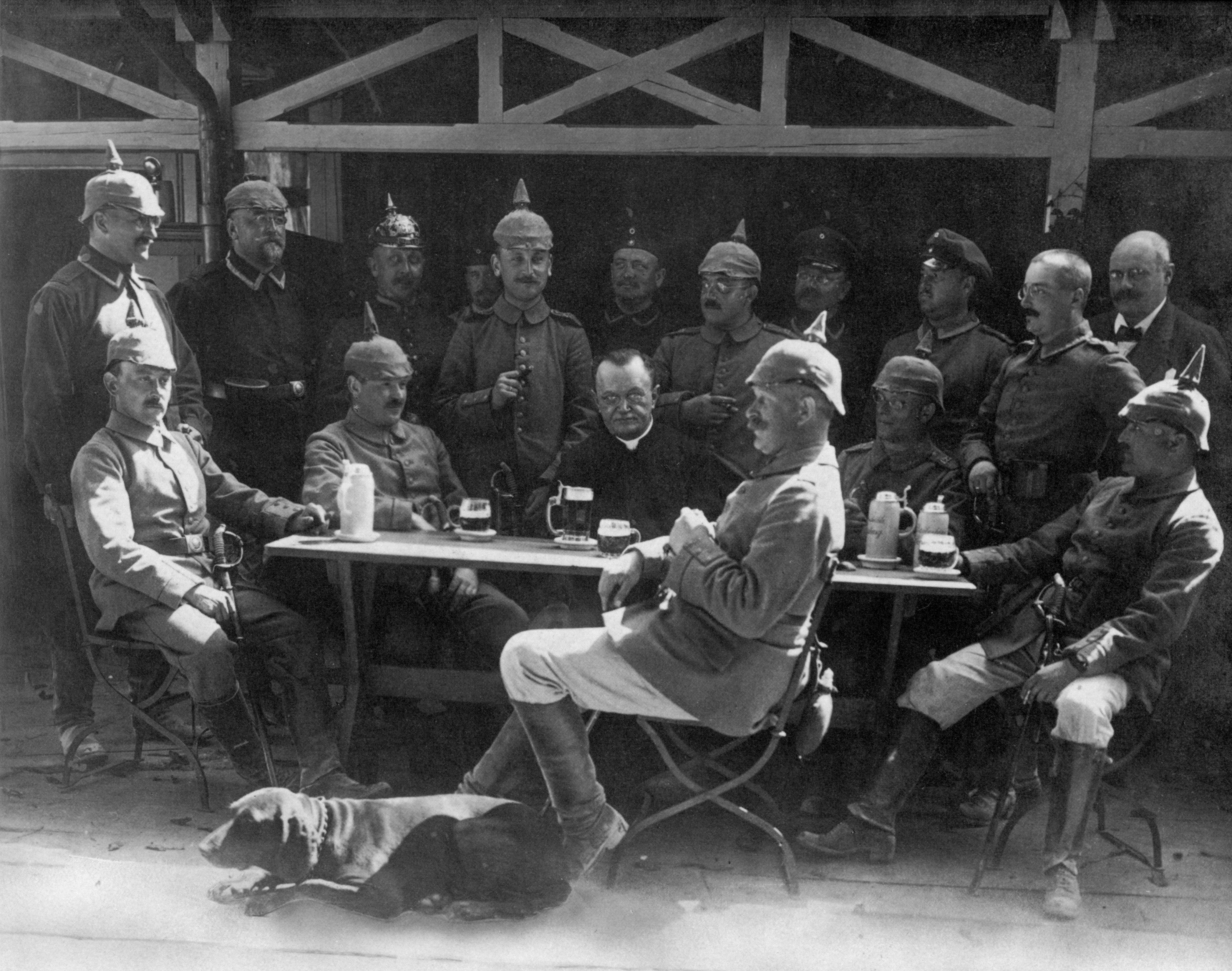 Der Garnisonspfarrer